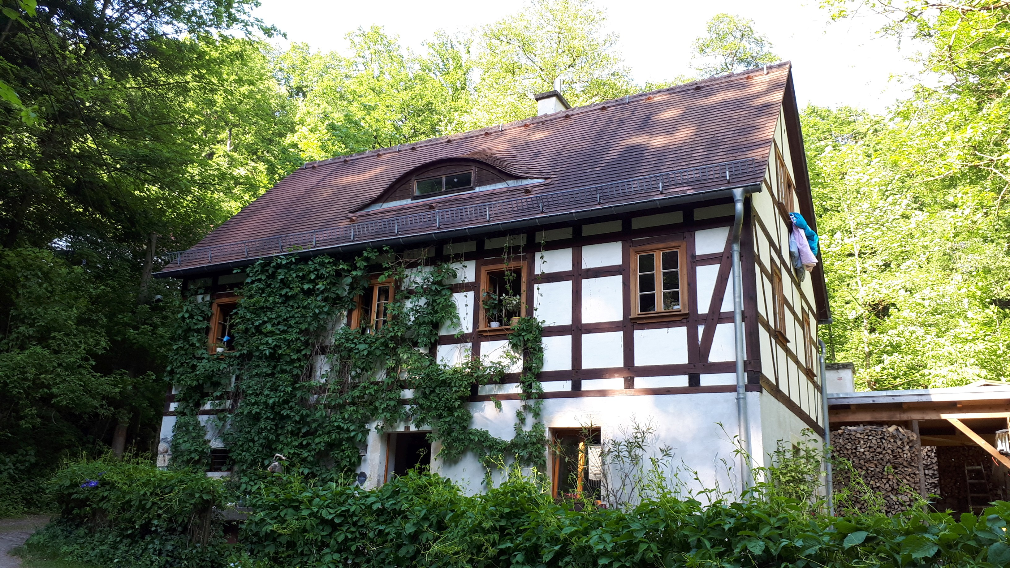 Wachwitzgrund 90, 01326 Dresden